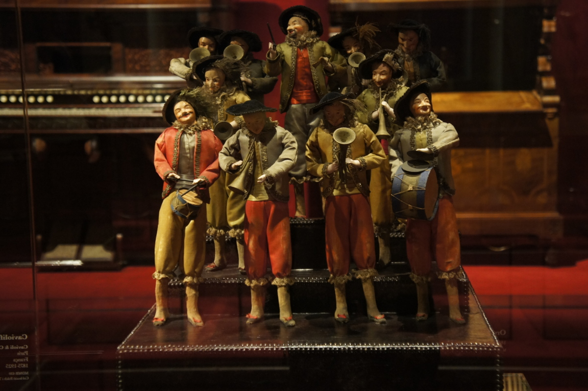 Museu_Musica_Orquestra d'autòmats_1850-1900_MDMB 1090